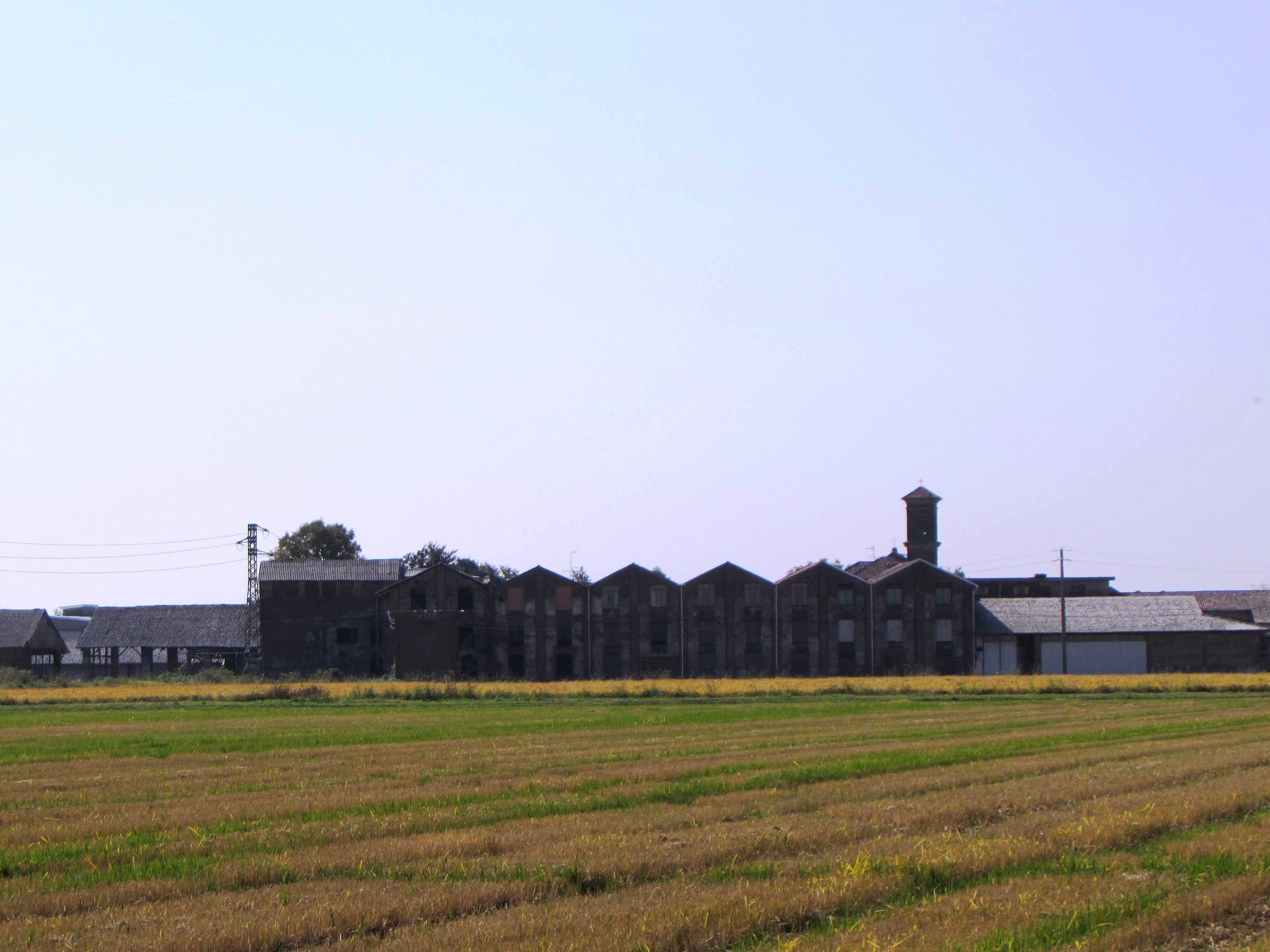 Veduta della Frazione Selve